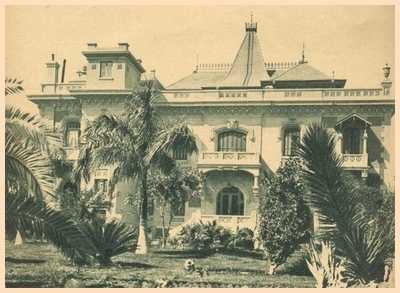 واجهة قصر الفرد بك شماس بضاحية مصر الجديدة